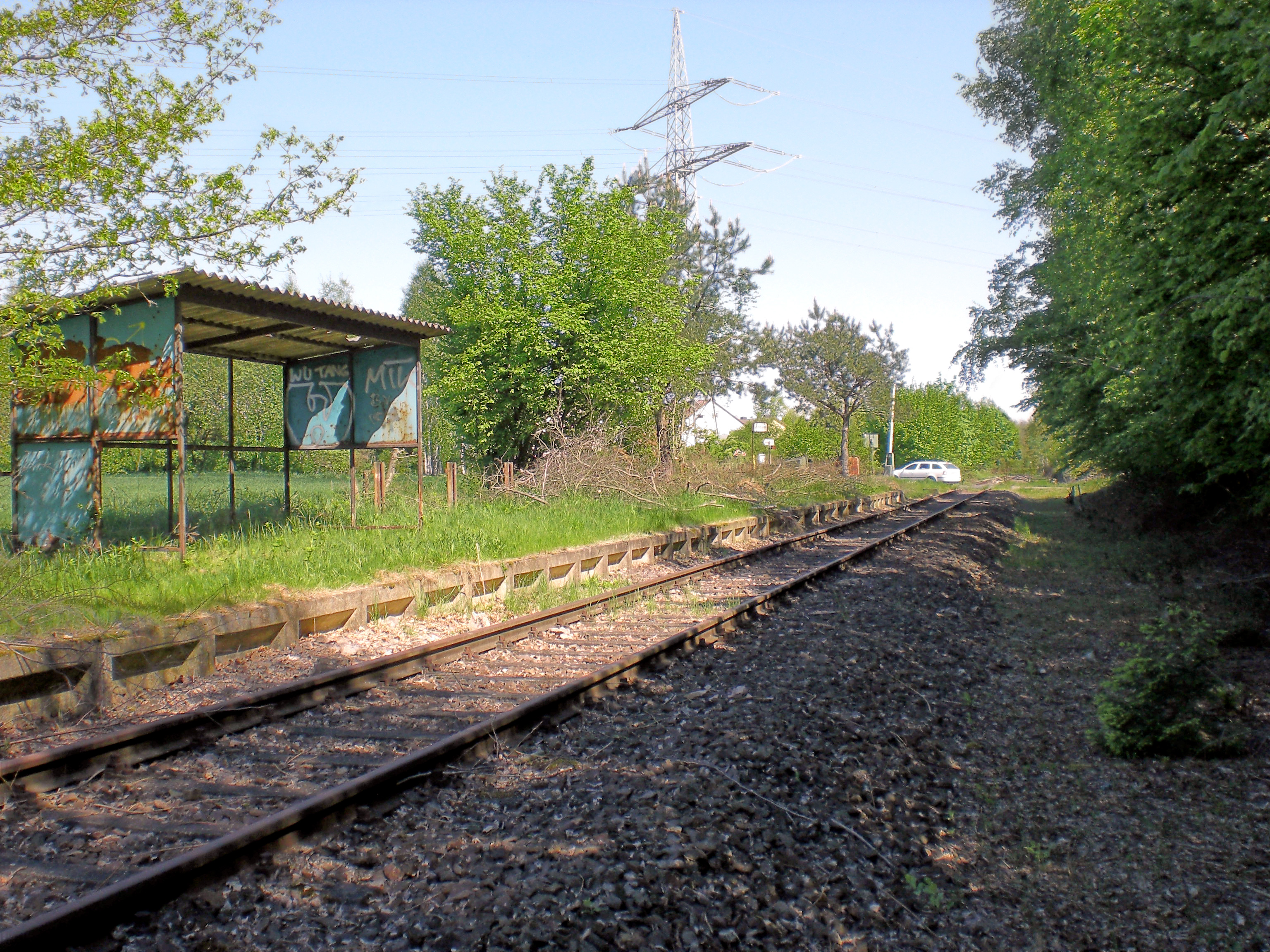 Hp Homburg-Beeden, Blickrichtung Homburg (Saar) nach dem Freischnitt im Frühjahr 2008